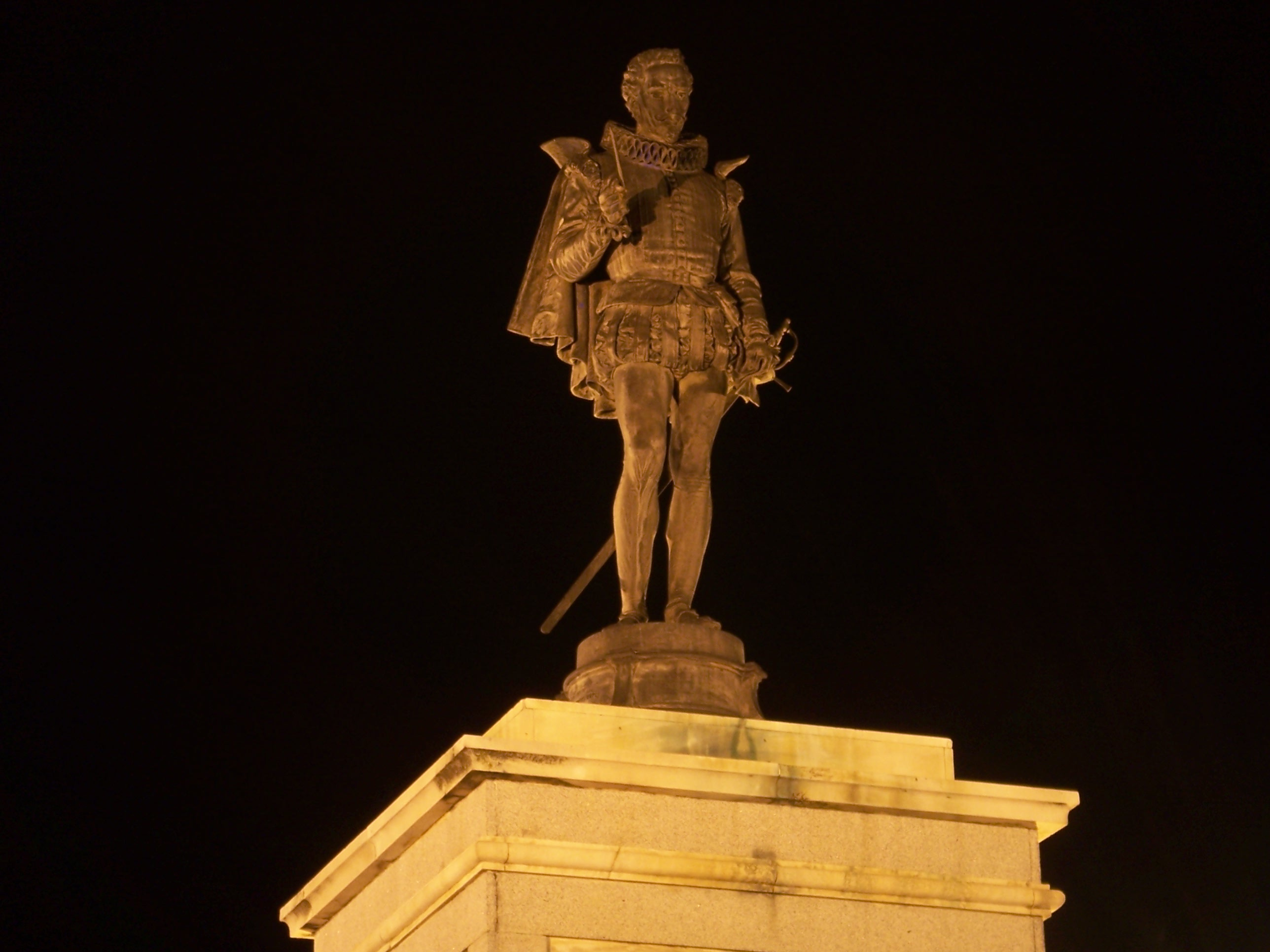 Statue of Miguel de Cervantes, Plaza de Cervantes, Alcalá de Henares, Spain